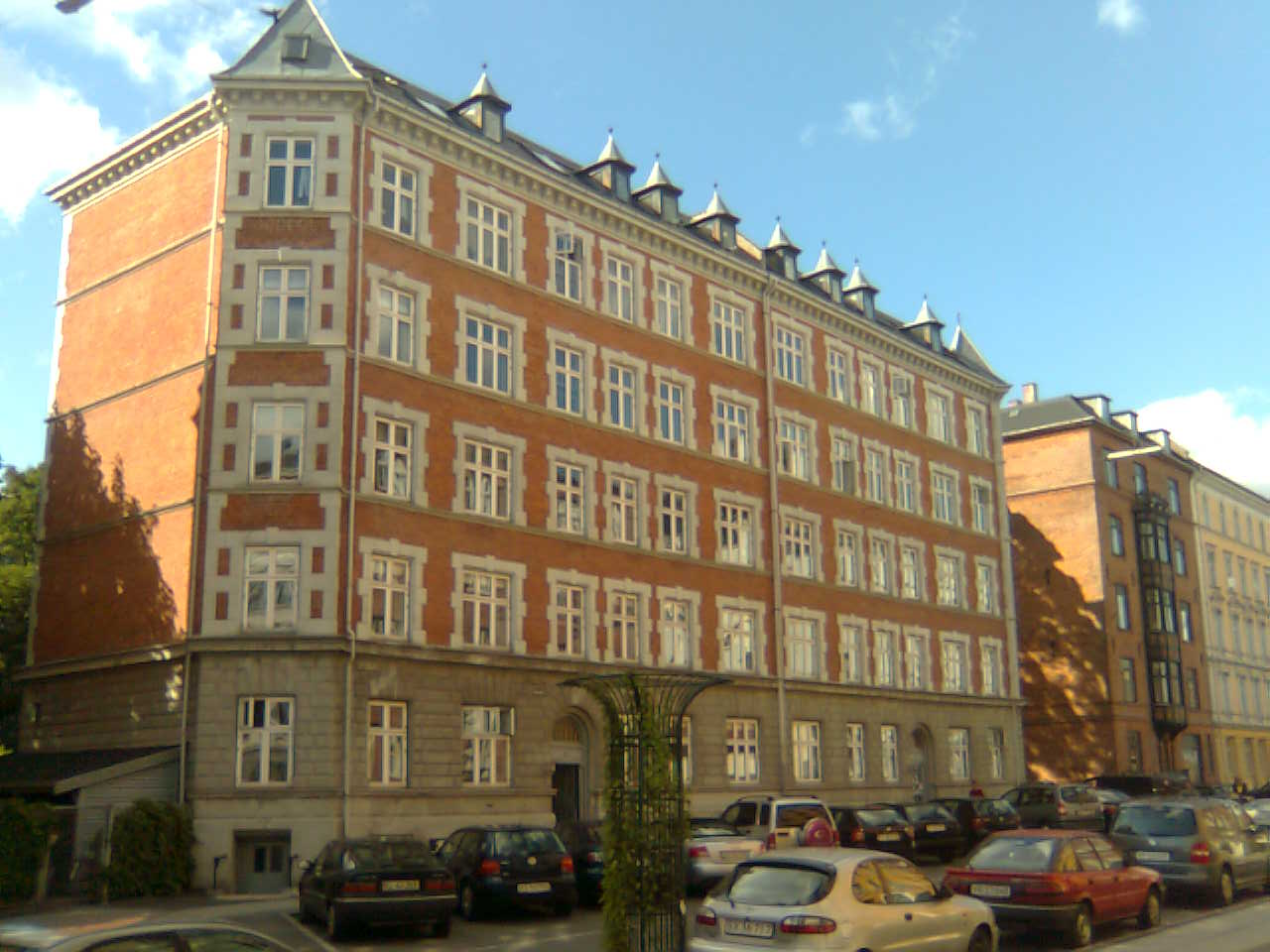 Jakob Dannefærds Vej 6a og 8.